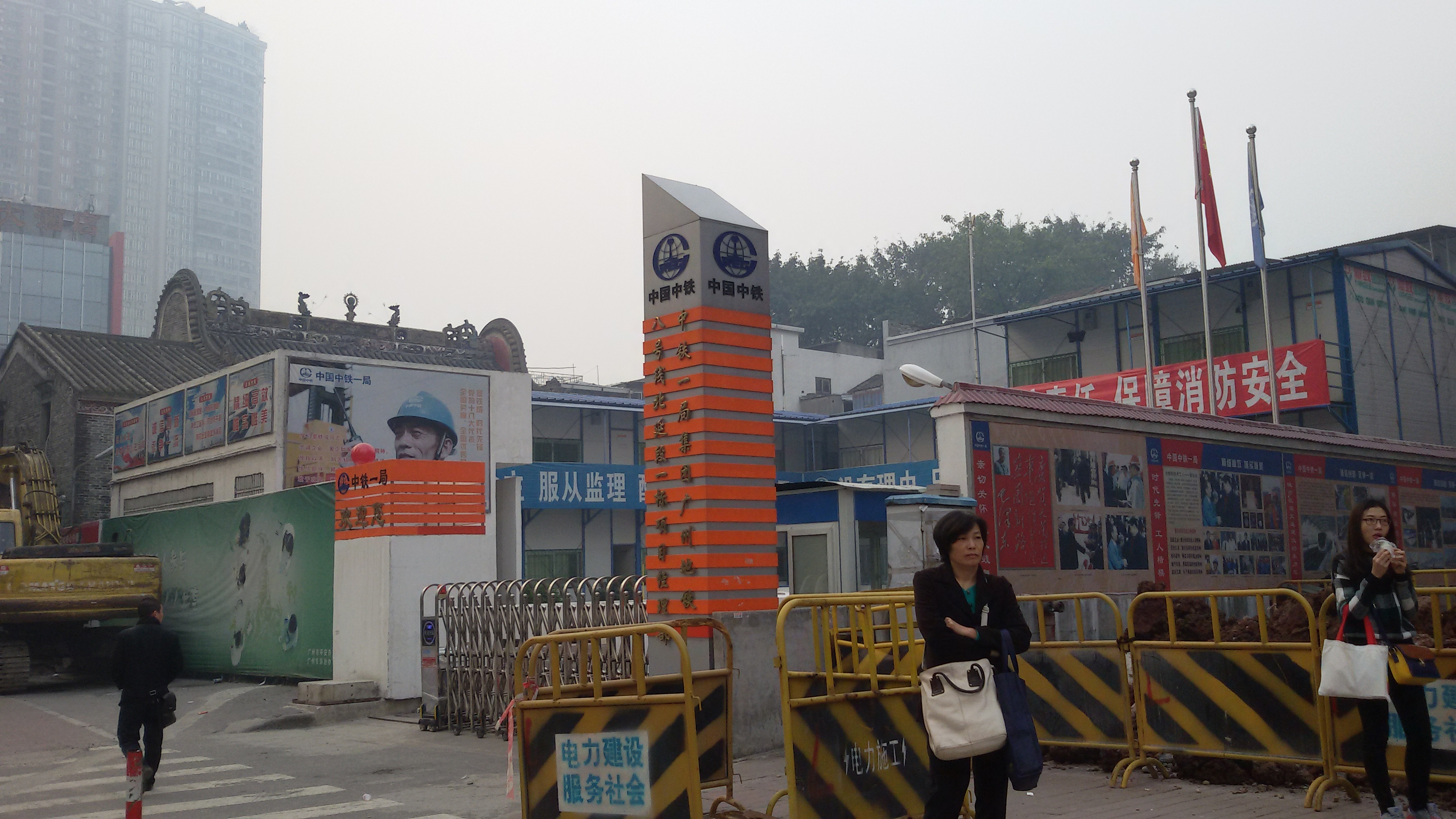 粵語: 2015年1月21號，華林寺站重喺度起緊。